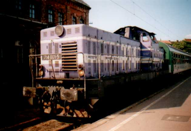 Lokomotiva řady 714